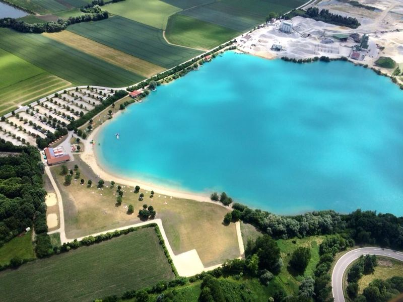 Aquapark - vogelperspektive